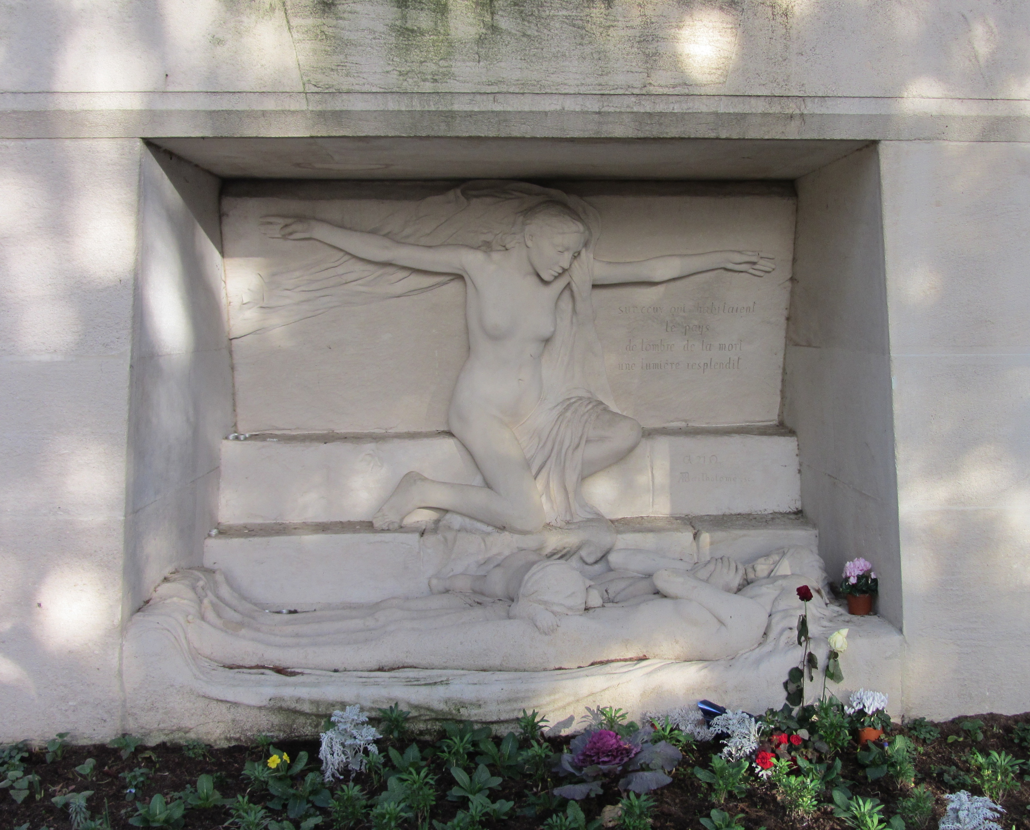 détail